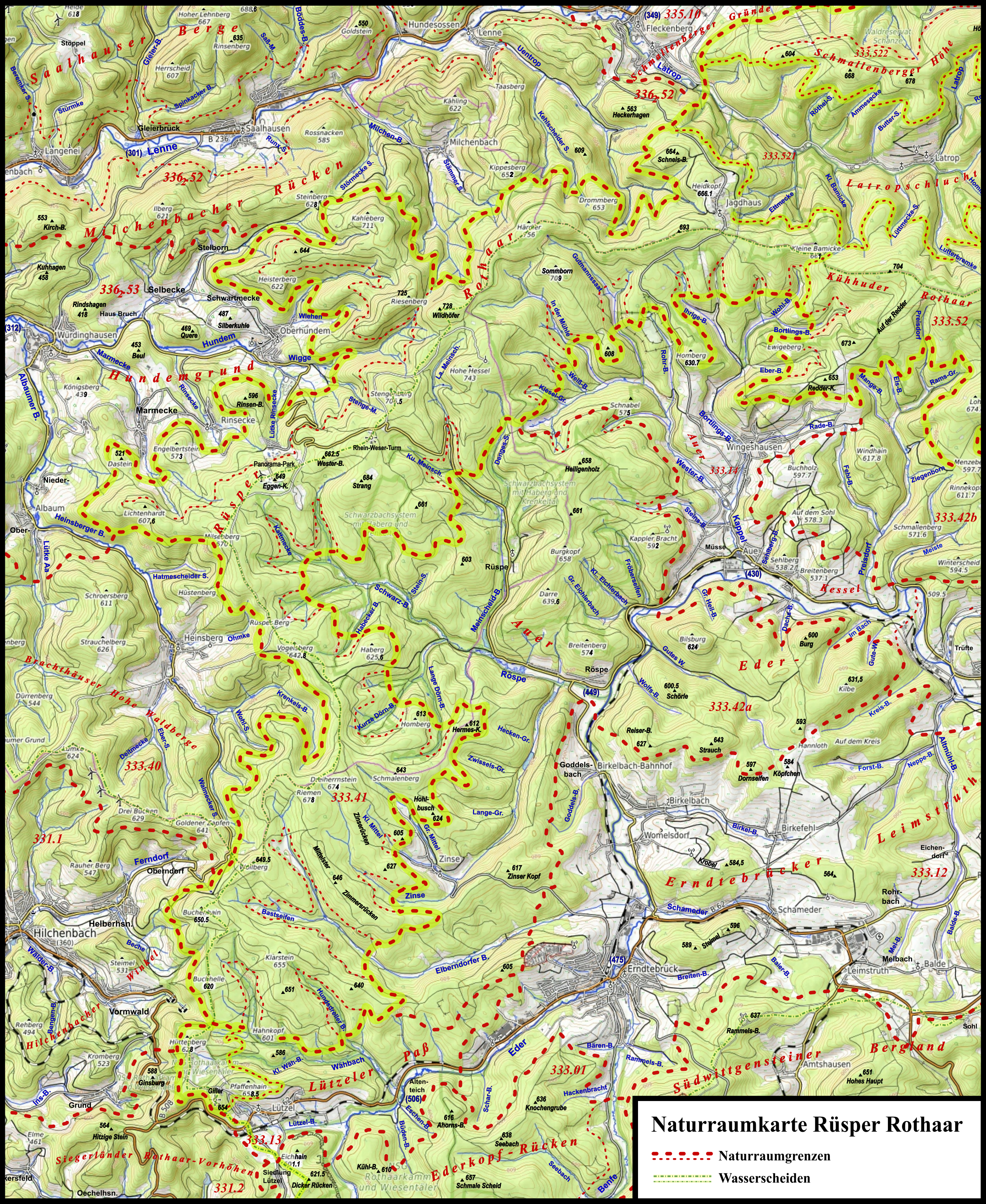 Naturraumkarte der bis 756 m hohen Rüsper Rothaar im Rothaargebirge mit Schmallenberg im Nordosten, Hilchenbach im Südwesten und Erndtebrück im Südosten nebst Nachbarnaturräumen; der den Kamm nach Süden fortsetzende Pfaffenwald (658,5 m) mit dem Giller und die von dort südostwärts verschwindende, letztlich östlich des Giller das Ebschloh erreichende Rhein-Weser-Wasserscheide sind ebenfalls hervorgehoben, ebenso die Kühhuder Rothaar als nordöstliche Fortsetzung.